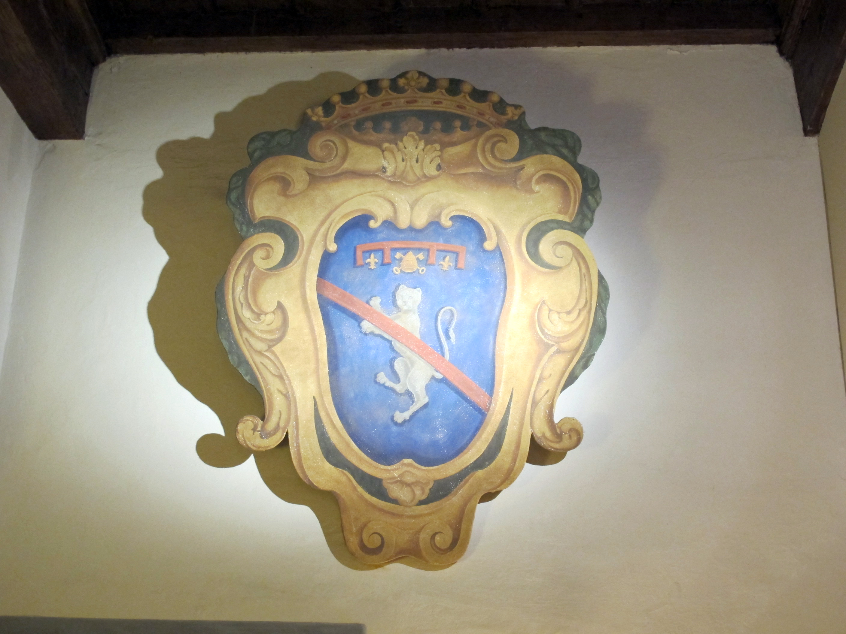 Palazzo niccolini al duomo, stemma niccolini